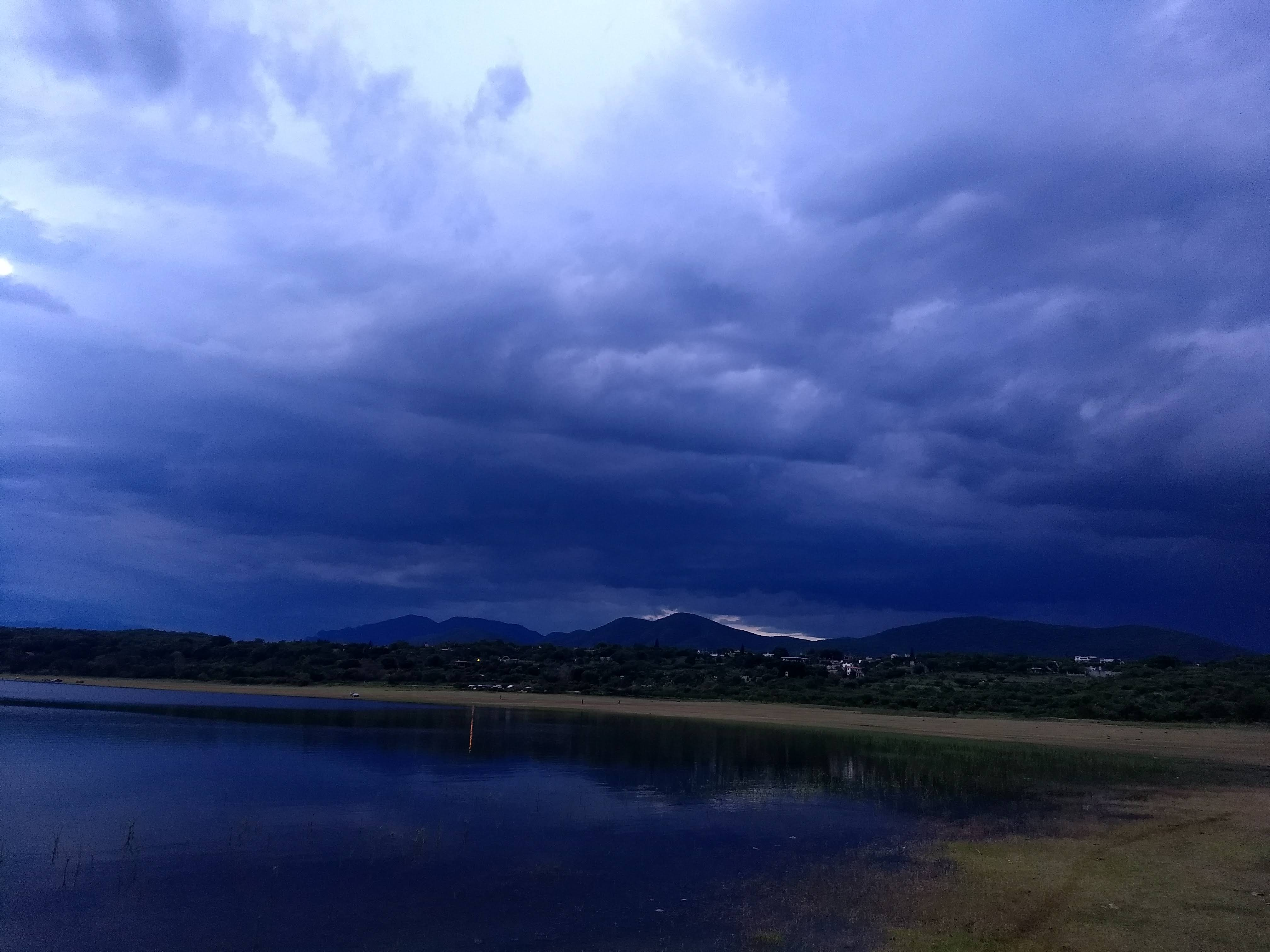 Fotografía de la laguna El Rodeo al atardecer 2018.